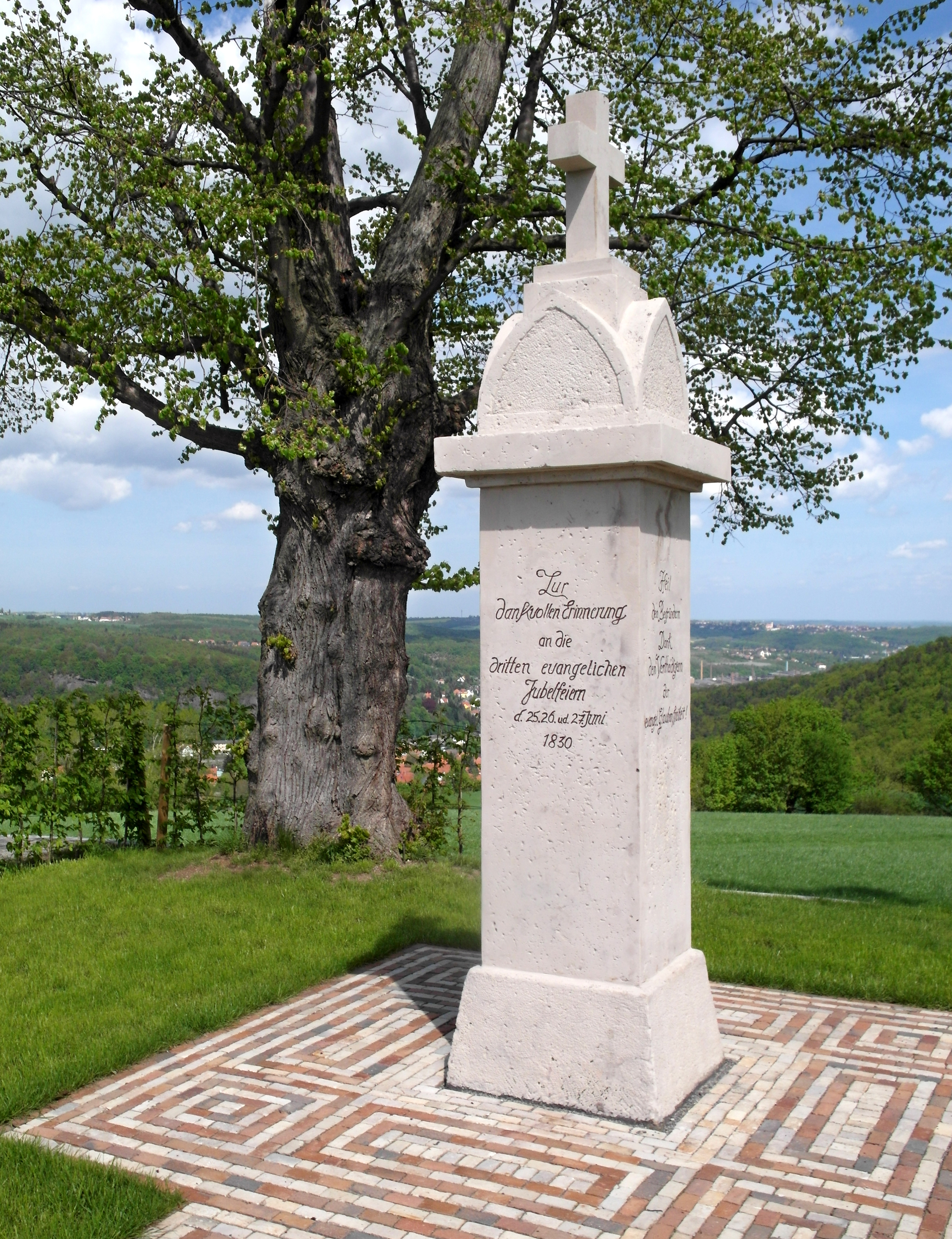 27.04.2018 01734 Rabenau Höhenstraße: Konfessionsdenkmal auf der König-Albert-Höhe, 349,7 m über NN. 1830 zur Erinnerung an die 300-Jahr-Feier der Überreichung der Augsburger Konfession an Kaiser Karl V. auf dem Galgen- berg errichtet und 1873 auf den heutigen Standort versetzt (GMP: 50.967818,13.632772). 2017 saniert. [SAM5550.JPG]20180427215DR.JPG(c)Blobelt